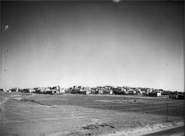 ירושלים - שכונת תלפיות.